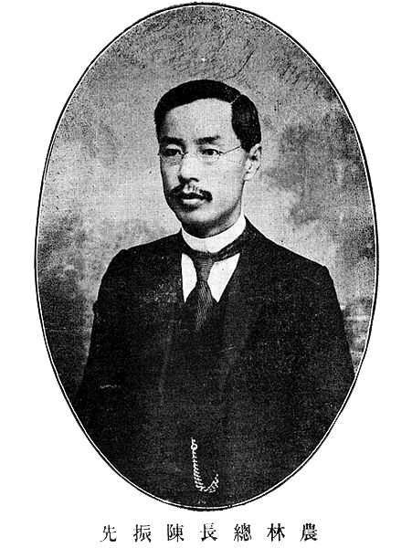 農林總長陳振先